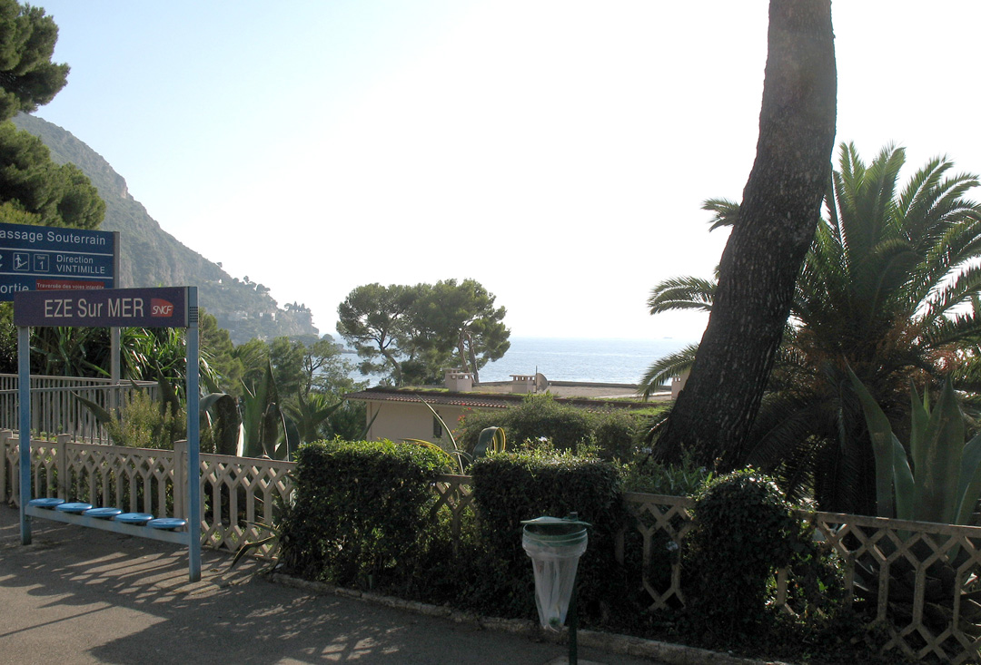 La gare d'Eze-sur-Mer, France